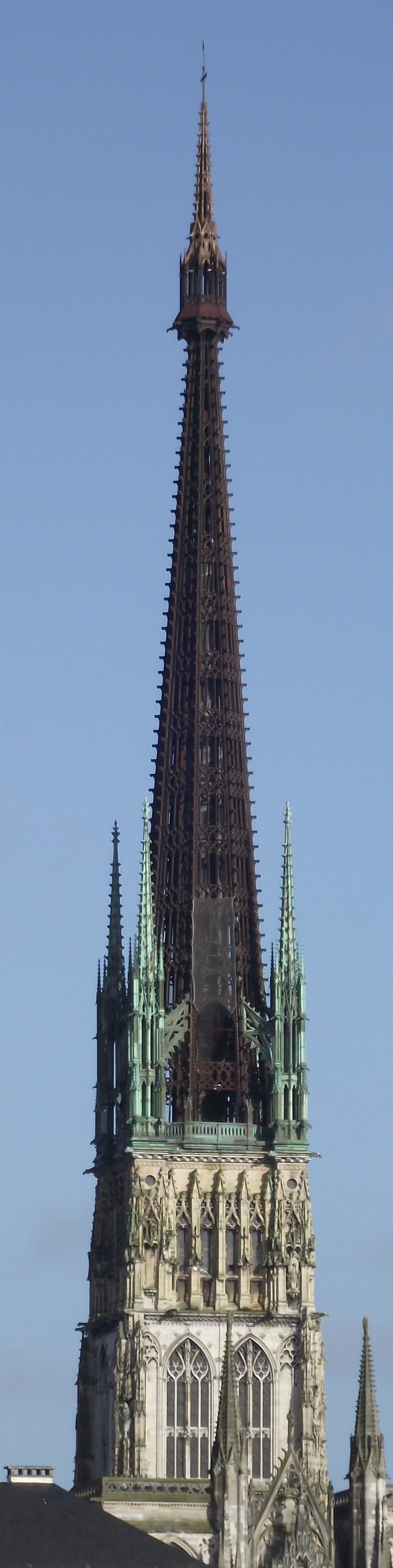 Rouen, Flèche de la cathédrale Notre-Dame